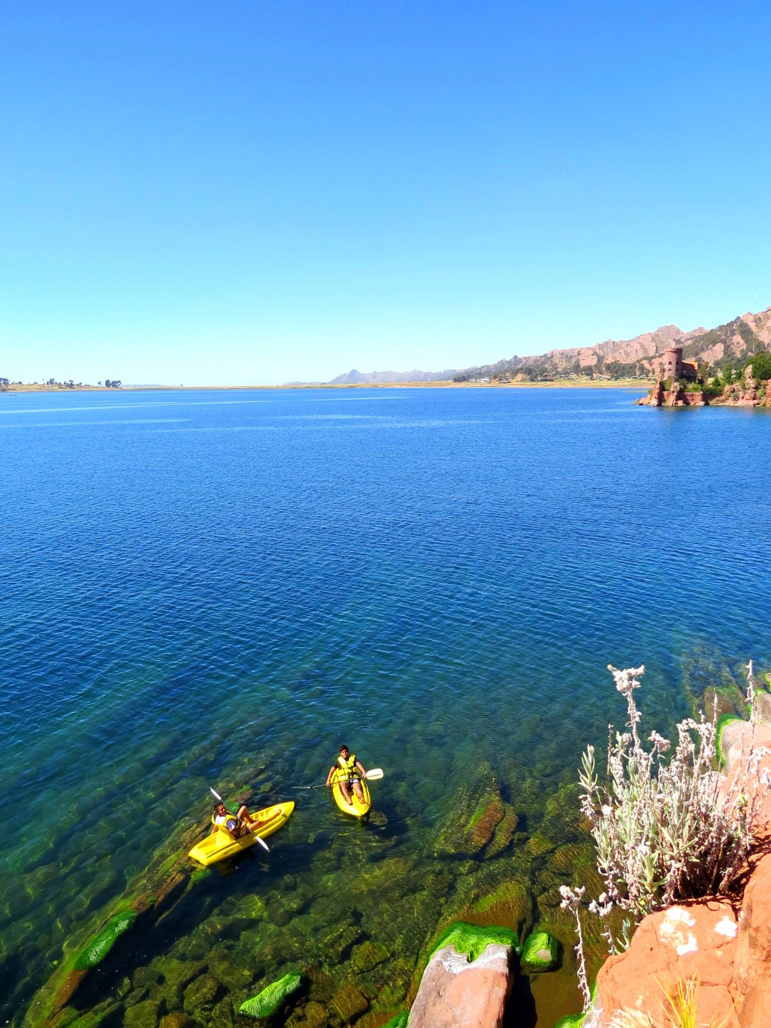 Platería Puno Peru